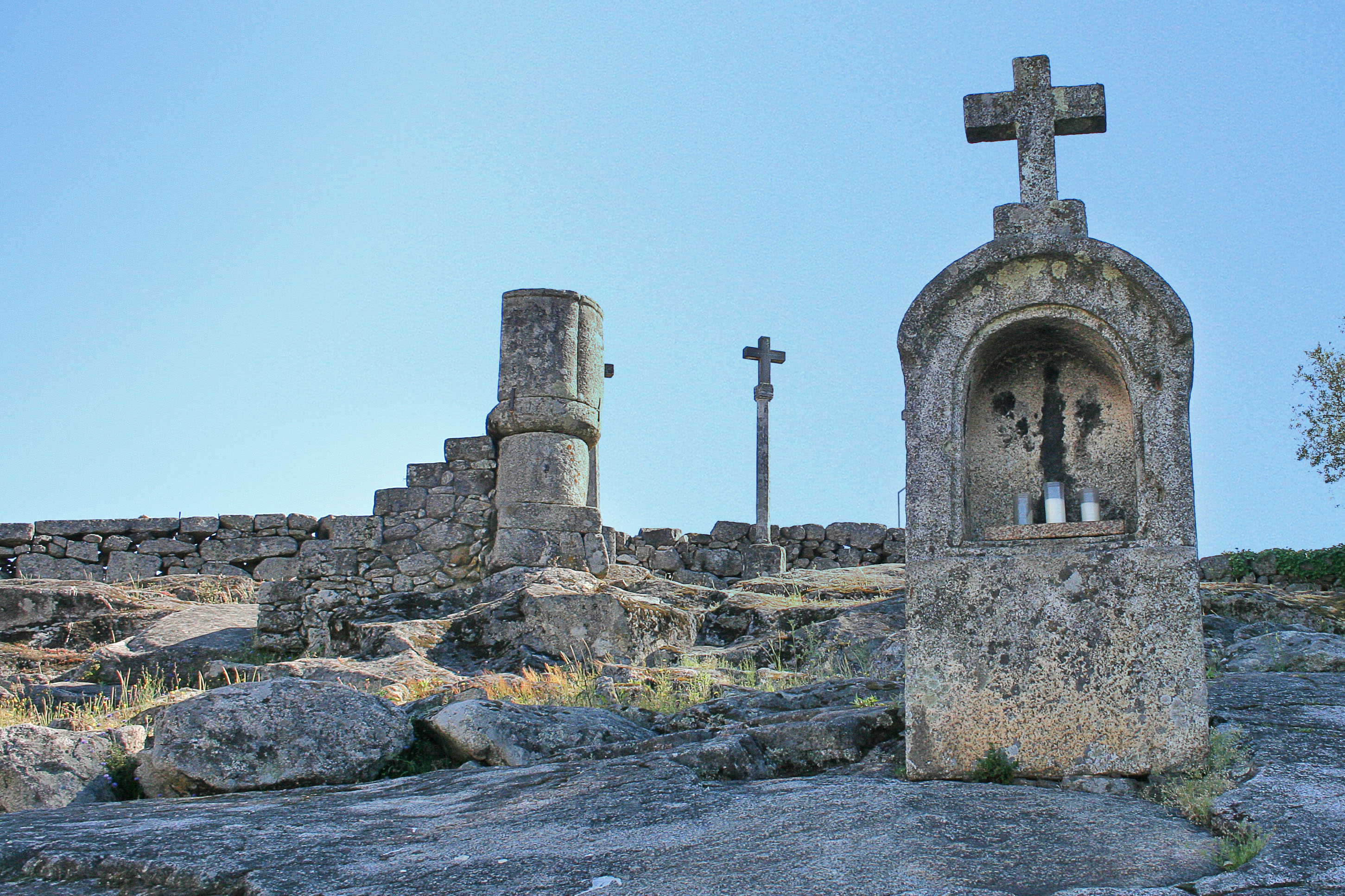 Fica sobre uma penedia, a norte da Vila de Arouca, sobressaindo na sua parte mais elevada 3 cruzes, das quais a central data de 1627; no centro tem um púlpito de pedra, datado de 1643, situando-se as restantes cruzes da via sacra espalhadas pelas diversas ruas da Vila.